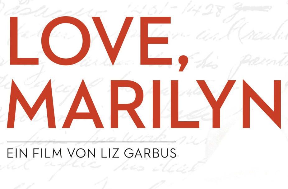 Love, Marilyn (Com Amor, Marilyn, no Brasil) é um documentário estadunidense de 2012 dirigido por Liz Garbus